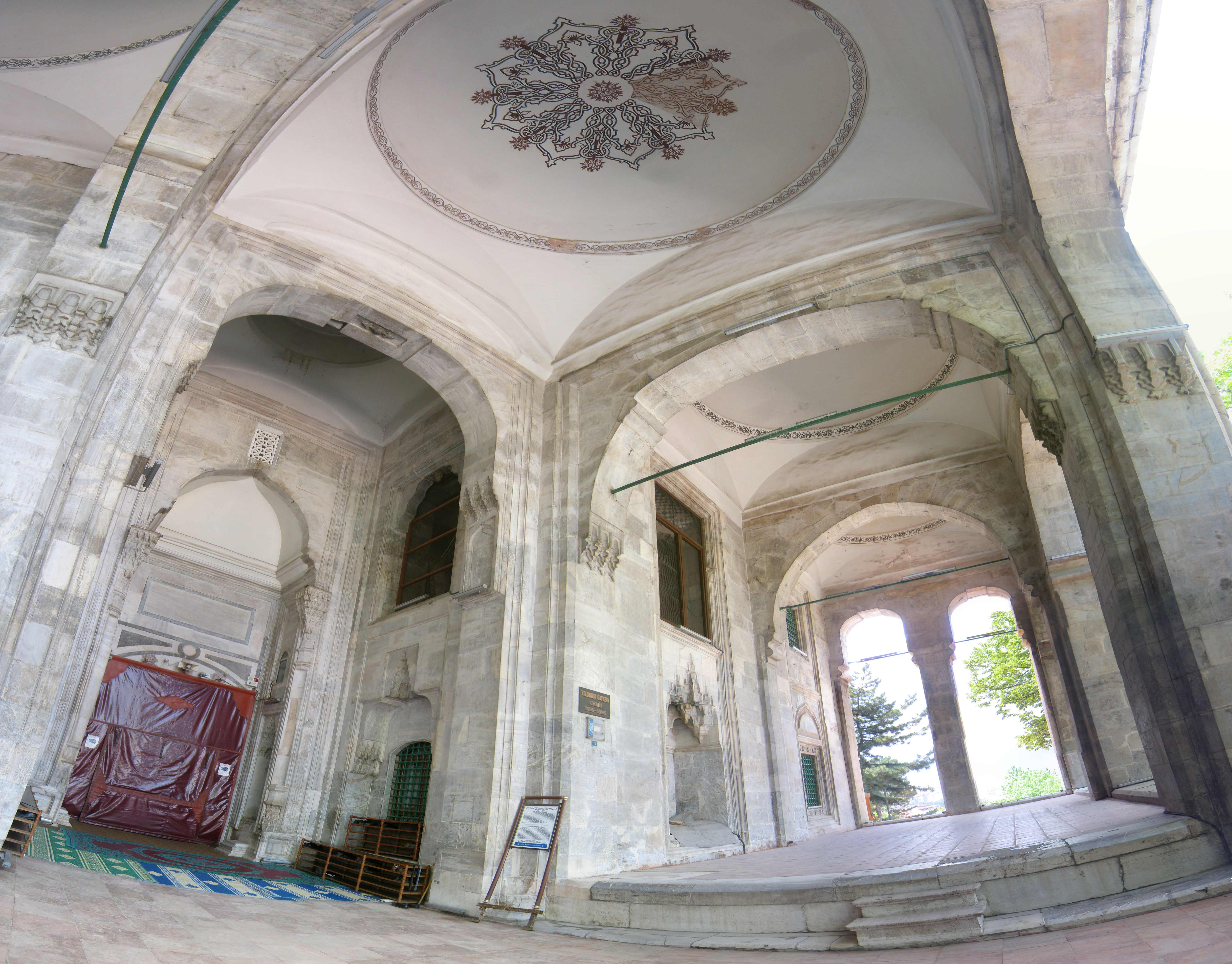 yıldırım bayezıd camii bursa